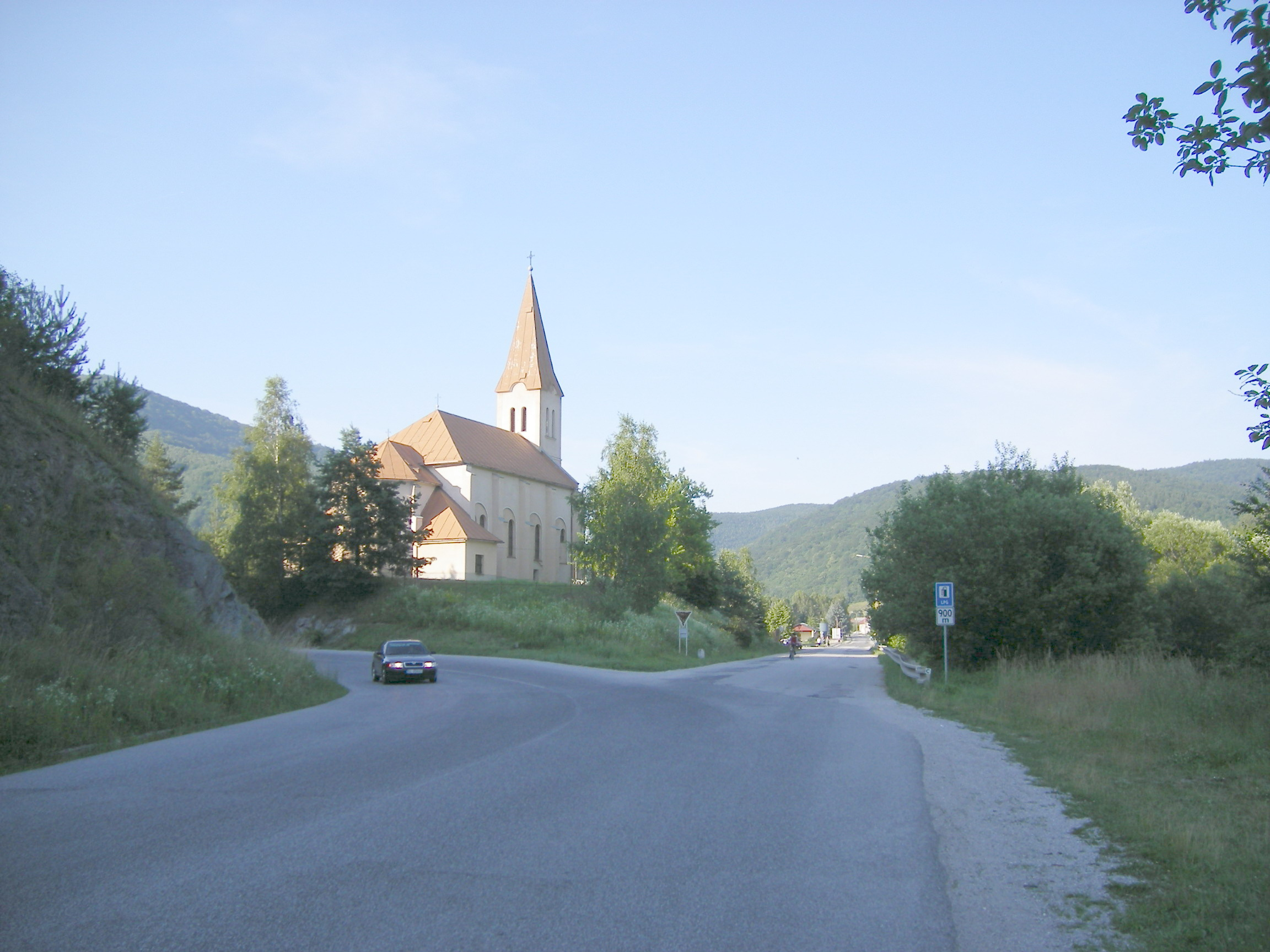 Margecany (okres Gelnica)